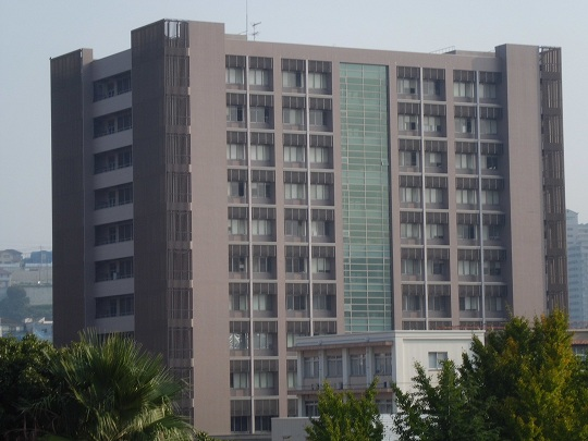 長崎大学総合教育研究棟